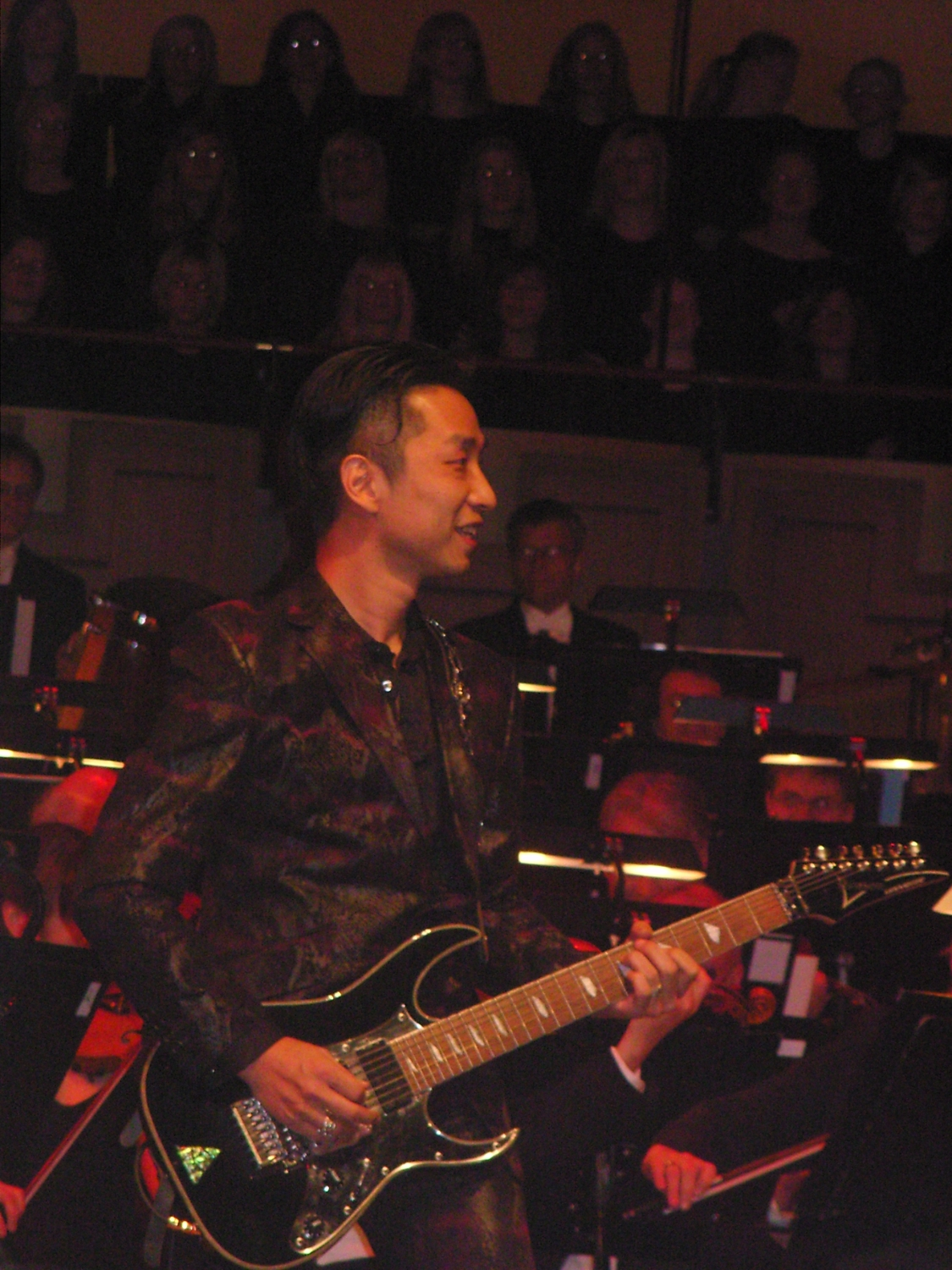 Akira Yamoaka enjoys himself